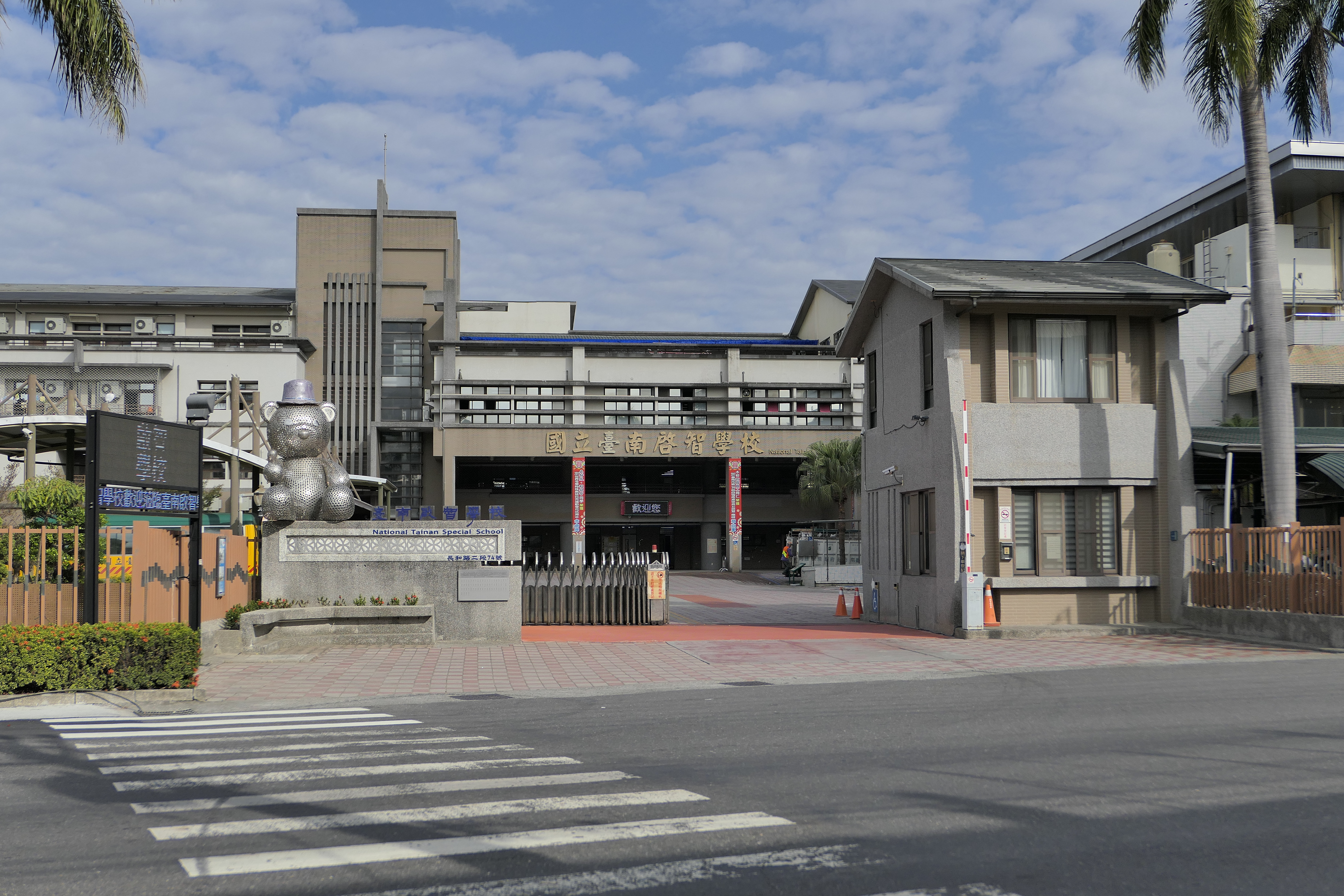 中文（台灣）: 國立臺南啟智學校